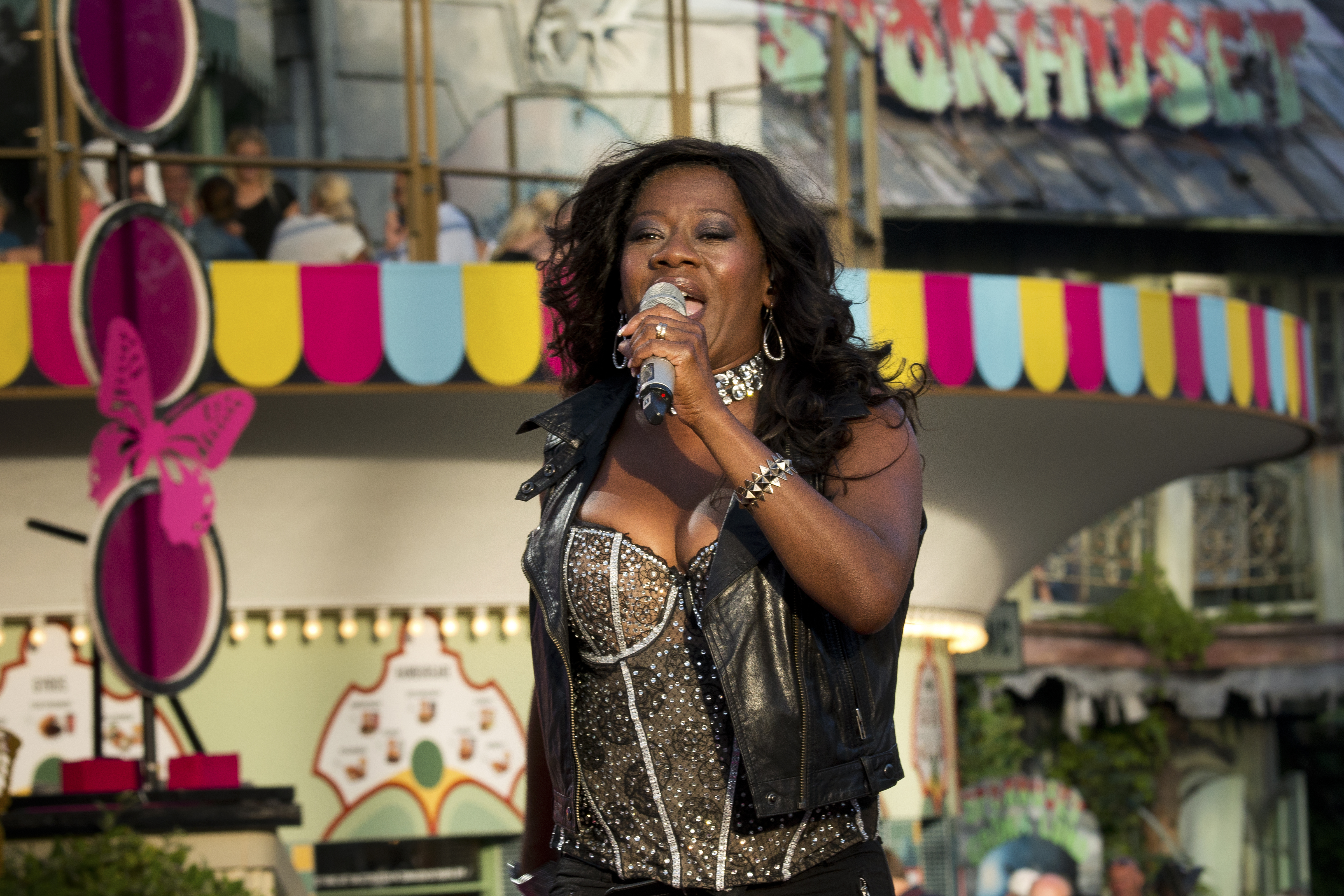 Gladys Del Pilar besöker Sommarkrysset i Stockholm, Gröna Lund